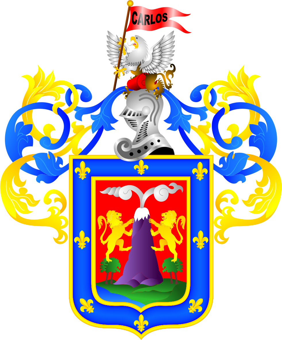 Distrito de Arequipa - Provincia de Arequipá - Región Arequipa